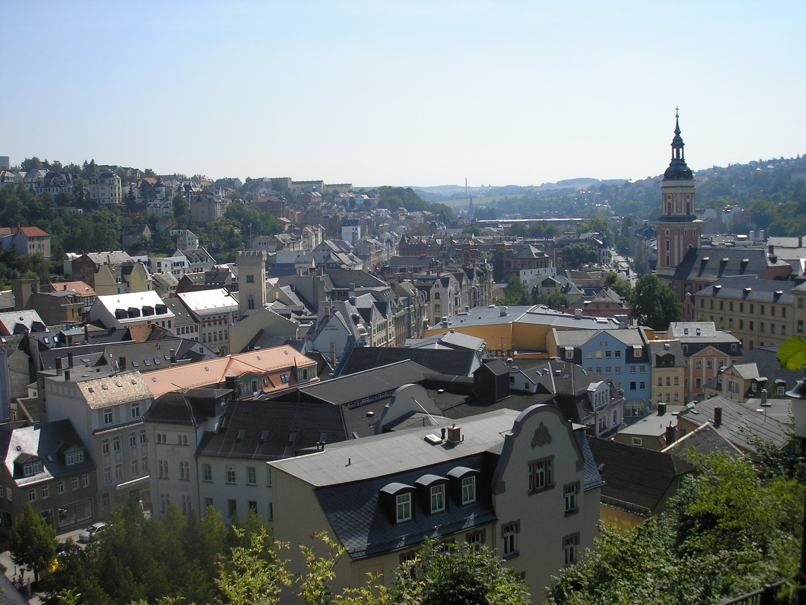 Blick über die östlichen Teile von Greiz (Thüringen).